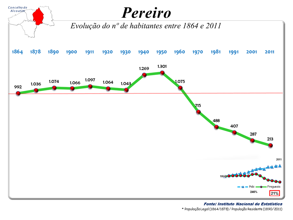 Censos 1864/2011